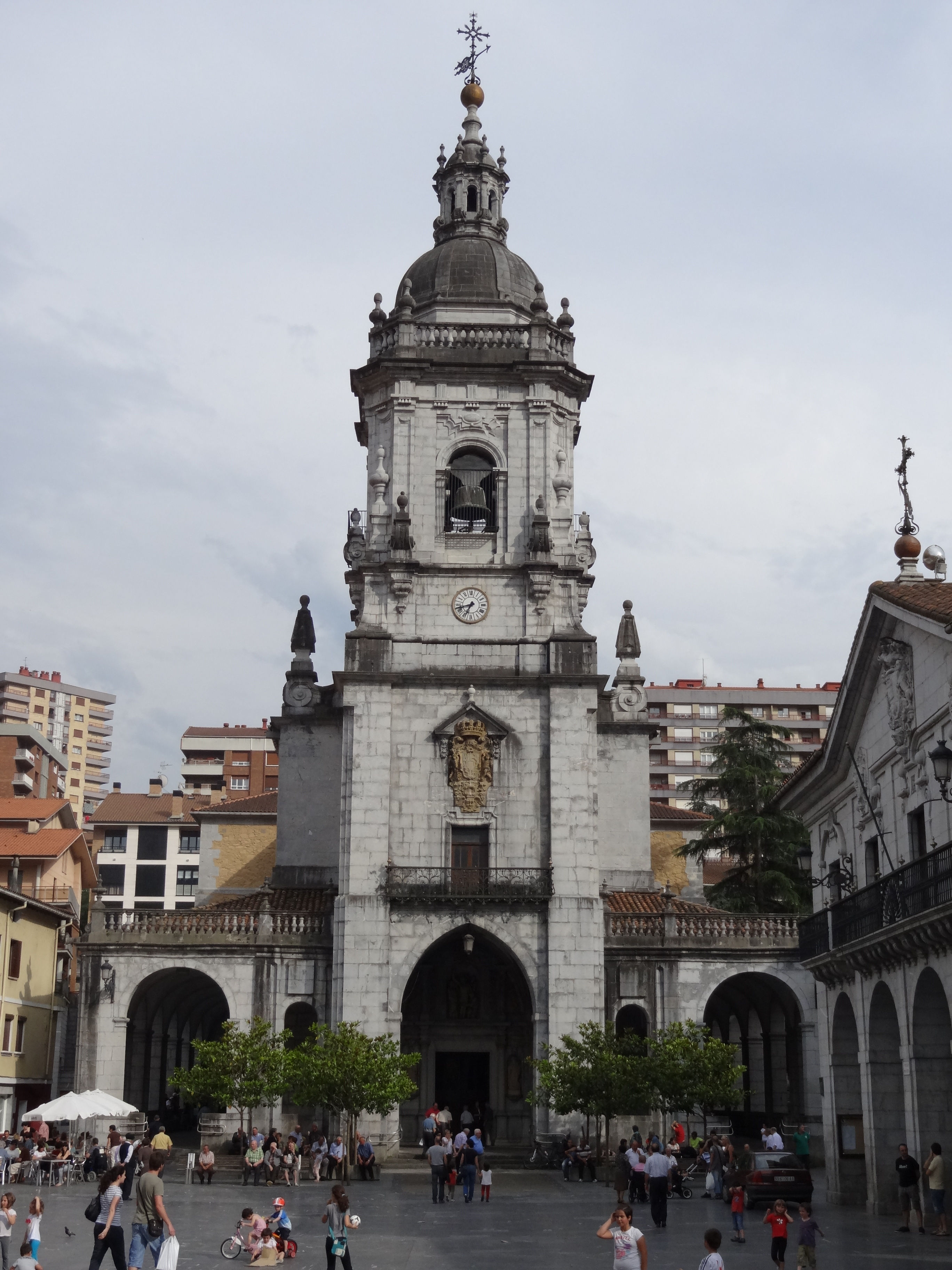 Church of San Bartolomé, Elgoibar